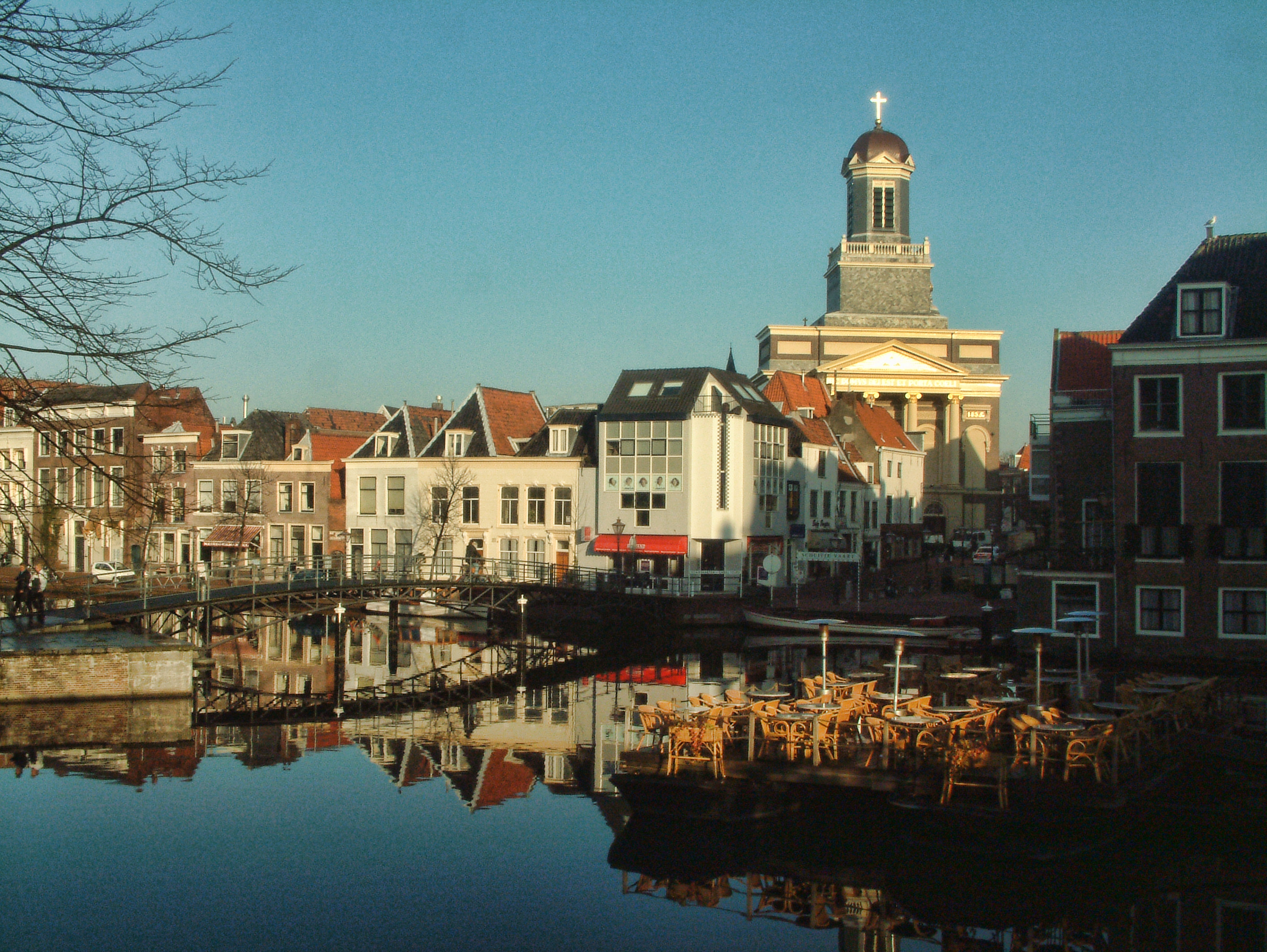 Hartebrugkerk Gebouwd in 1836 De nieuwe katholieke kerk werd de Hartebrugkerk genoemd